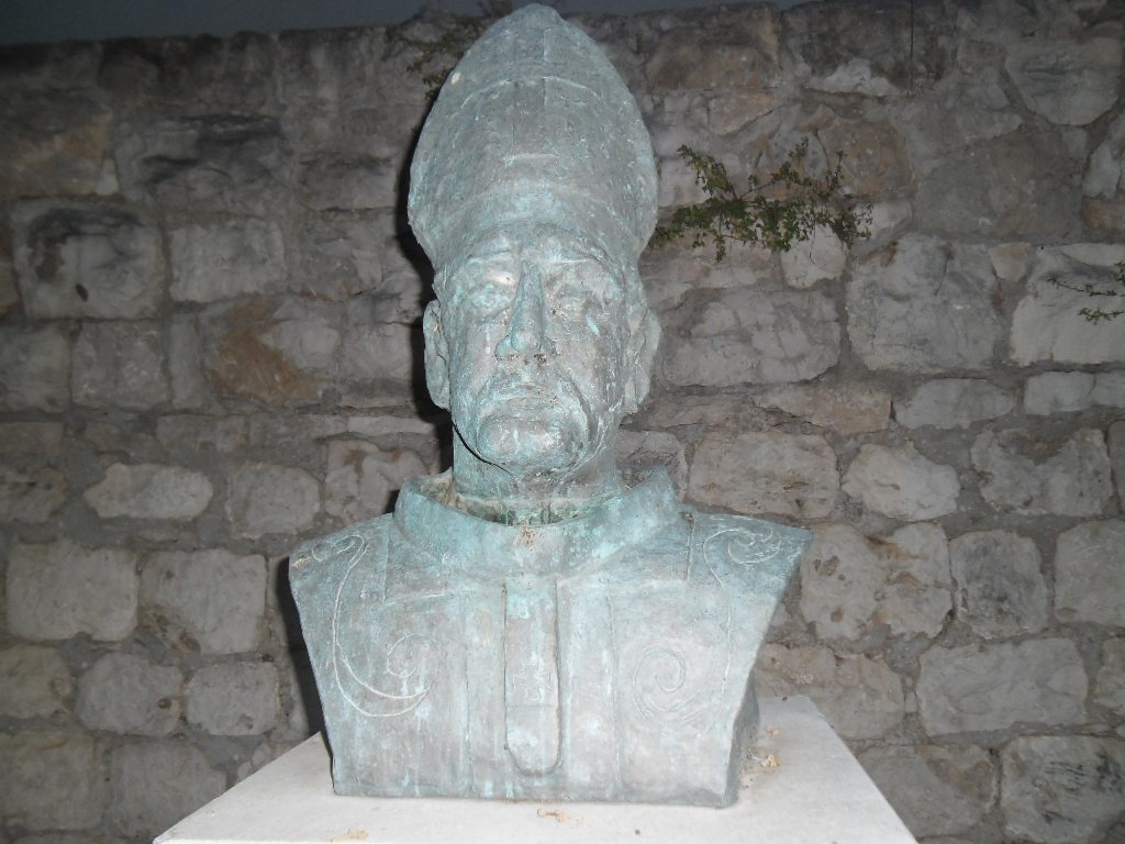 grad Hvar